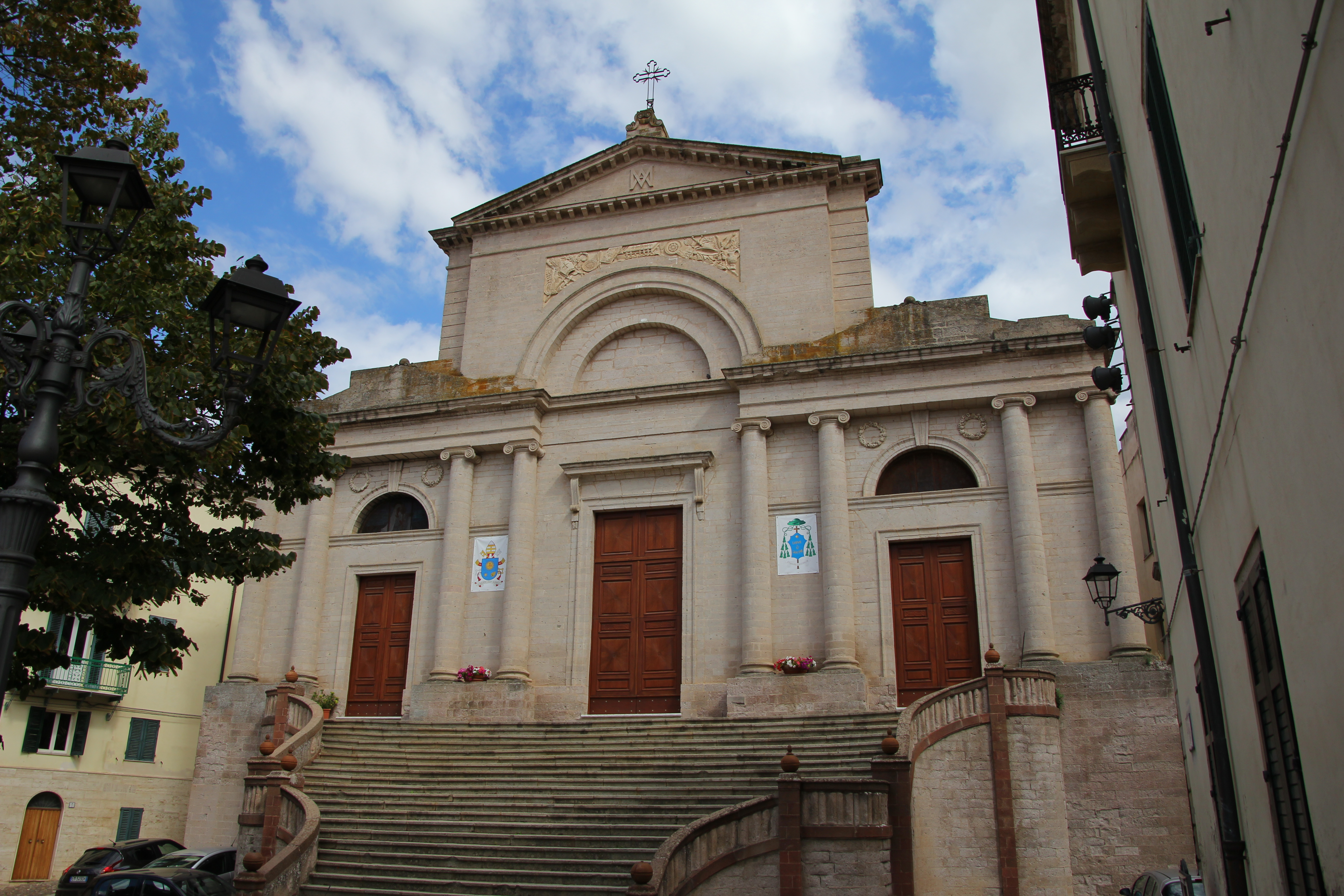 Ozieri - Cattedrale dell'Immacolata